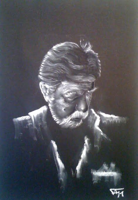 Autoportet architekta Antoniego Filipowicza.